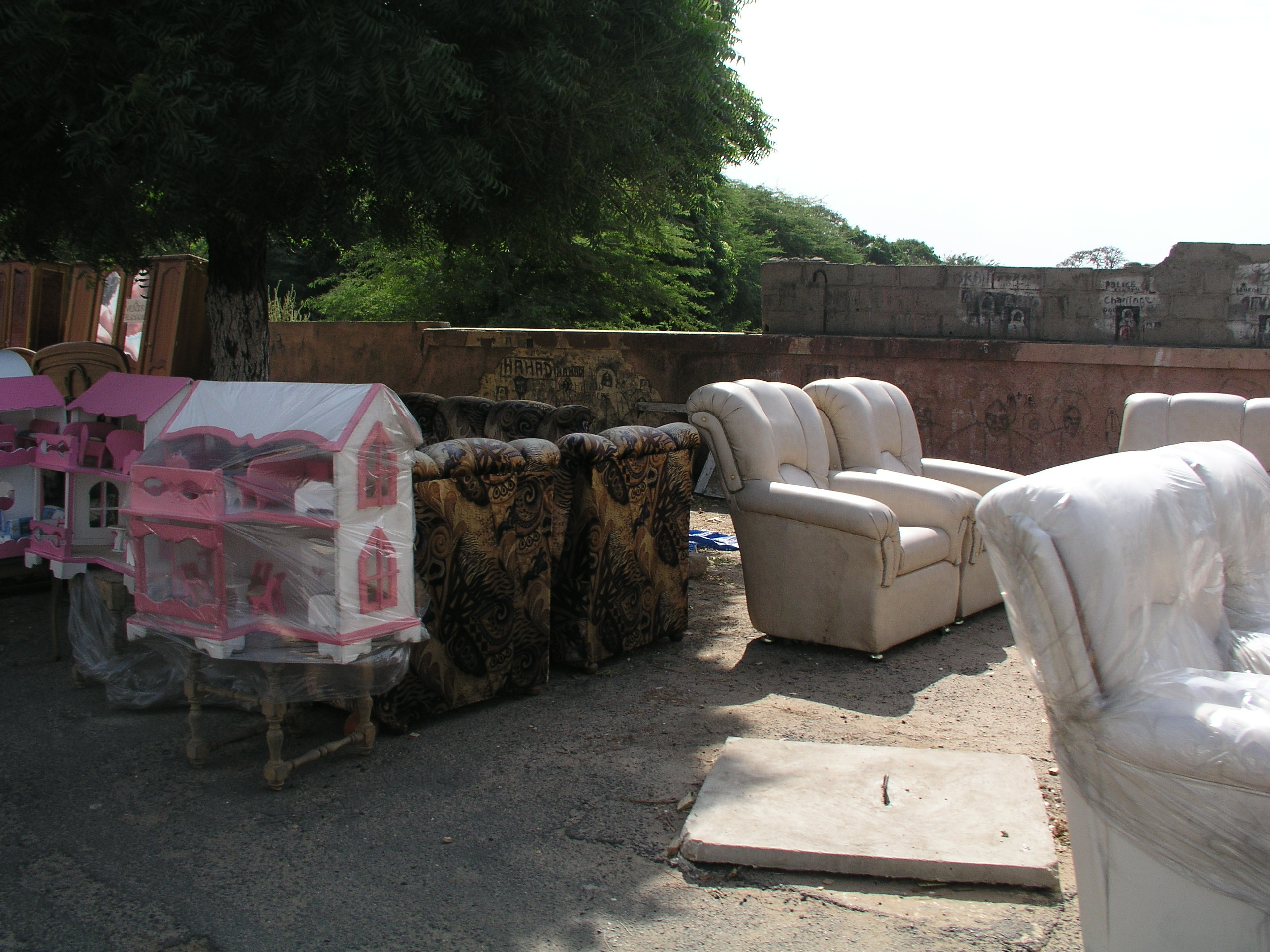 Secteur informel au Sénégal : vente de maisons de poupées et de meubles sur les trottoirs à Dakar. A noter les graffiti sur le mur du fond : portraits d'Ahmadou Bamba